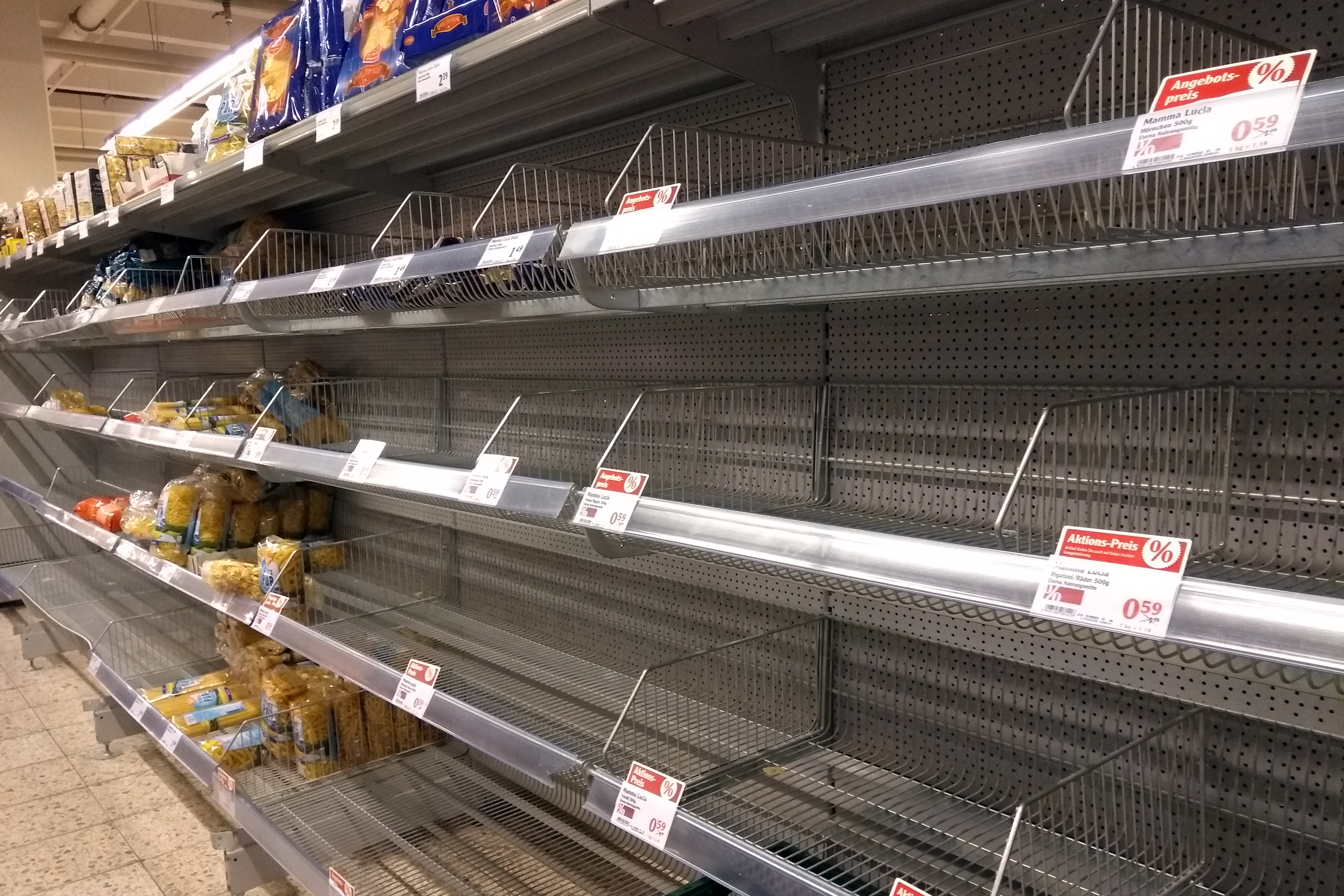 Leere Regale, Hamsterkäufe in Deutschland